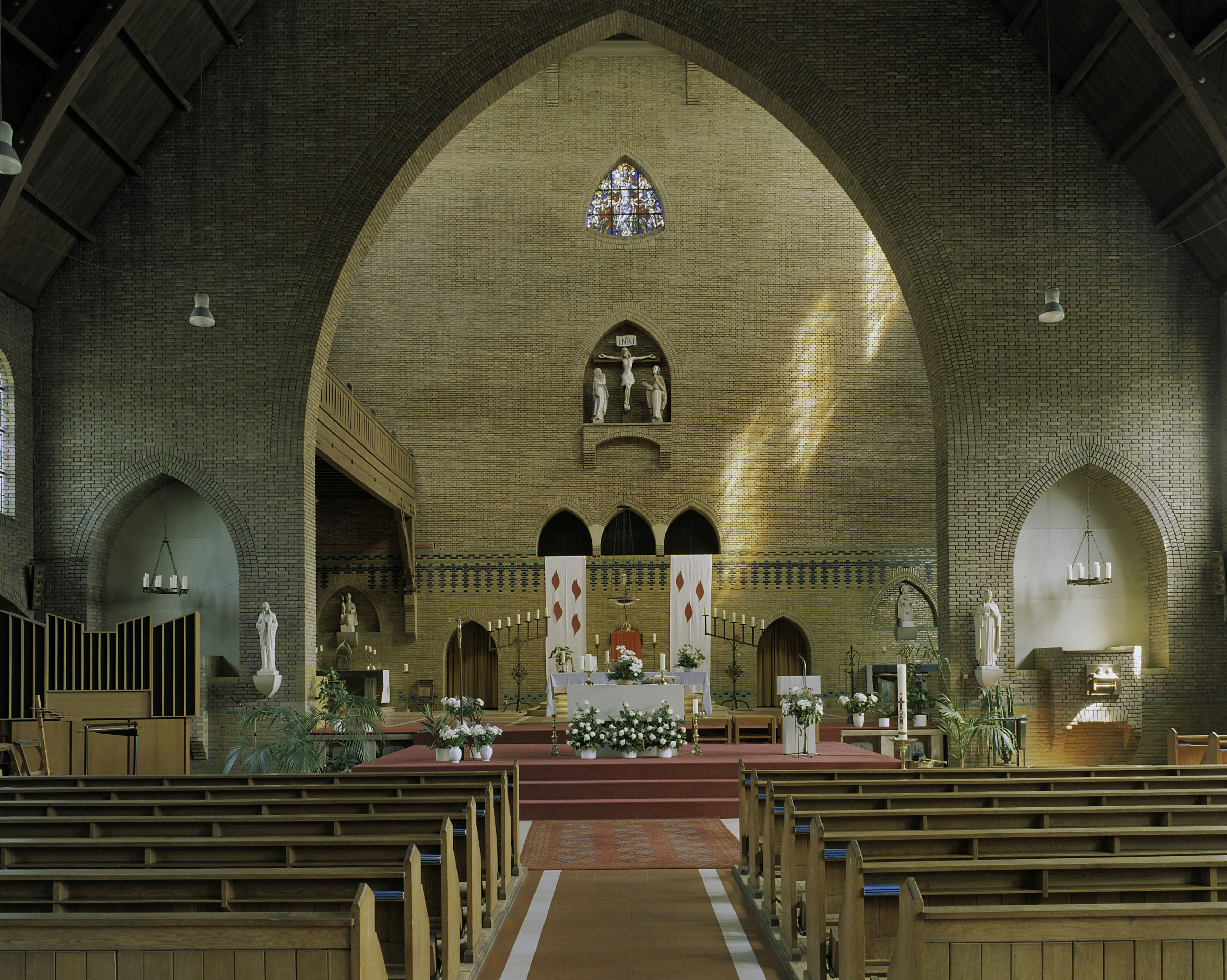 Kerkcomplex: kerk en pastorie: Interieur, overzicht richting koor